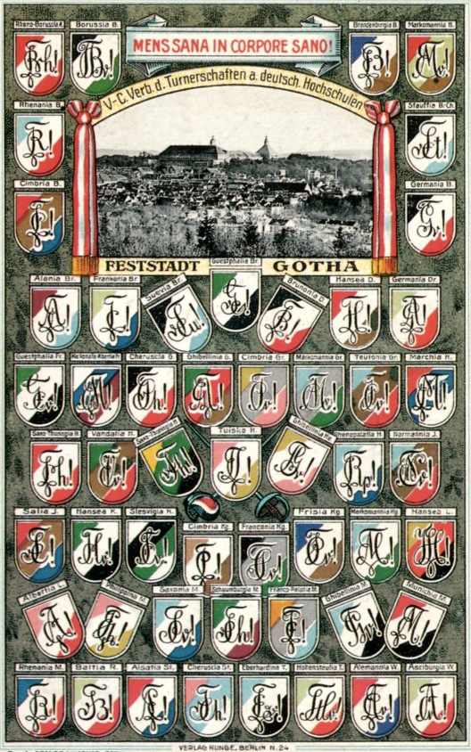 Members of Vertreter-Convent in 1911 of Turnerschaften